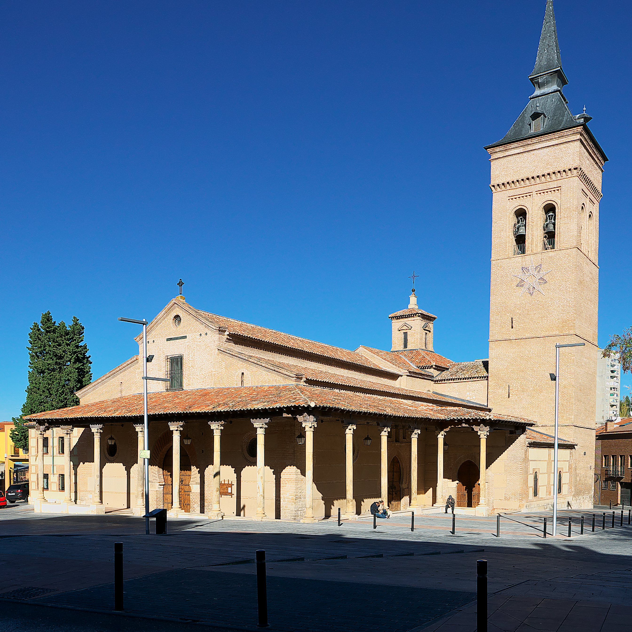 Iglesia con orígenes en los siglos XIII y XIV, en ella se venera a la imagen de Nuestra Señora de la Fuente.